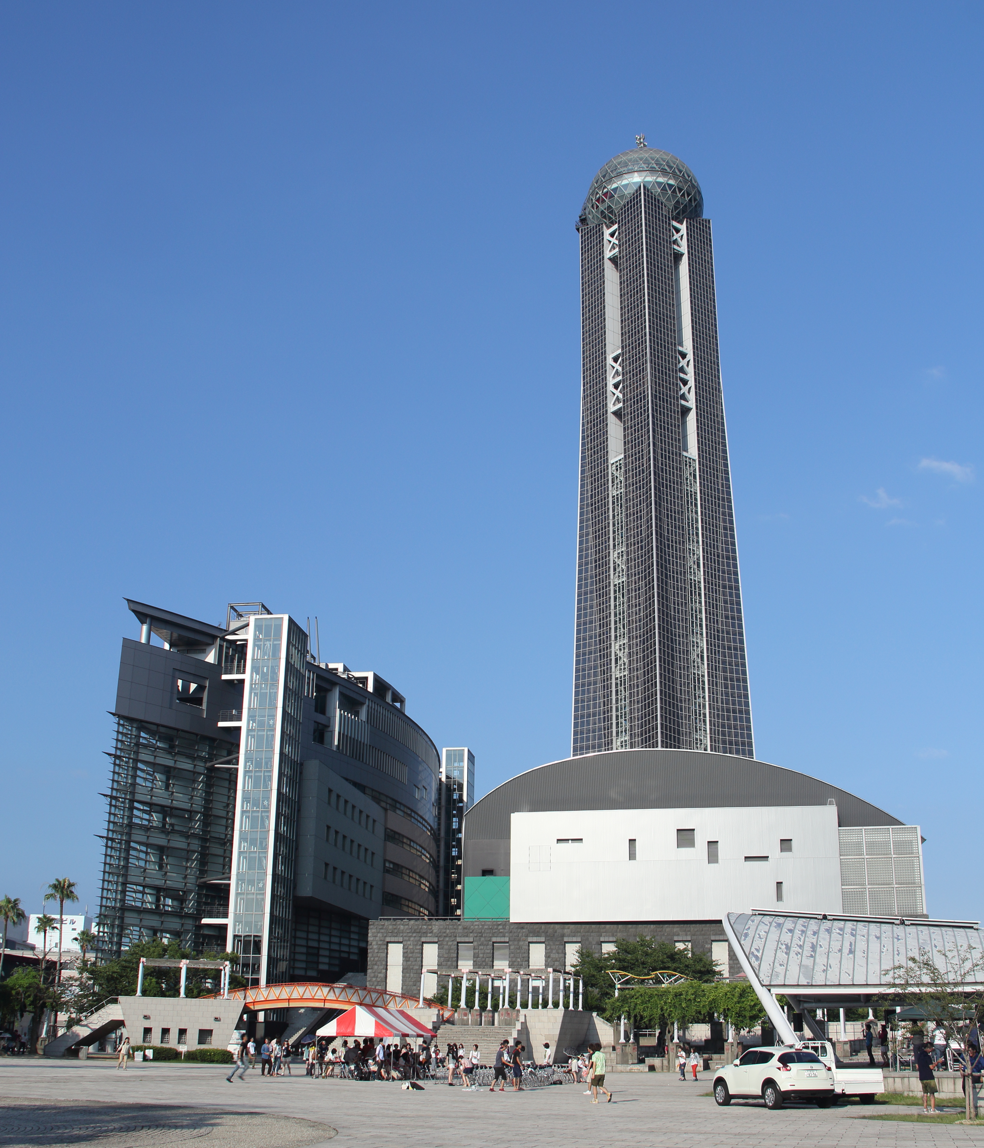 山口県国際総合センター（海峡メッセ下関） Canon EOS 60D